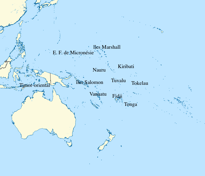 Carte de l'Océanie indiquant les Etats et territoires membres du Forum du développement des îles du Pacifique. Il s'agit d'une adaptation du fichier ""BLANK in Oceania (small islands magnified) (-mini map -rivers)" créé par l'utilisateur TUBS pour Wikimedia Commons. Je n'ai fait qu'ajouter les noms des pays concernés.